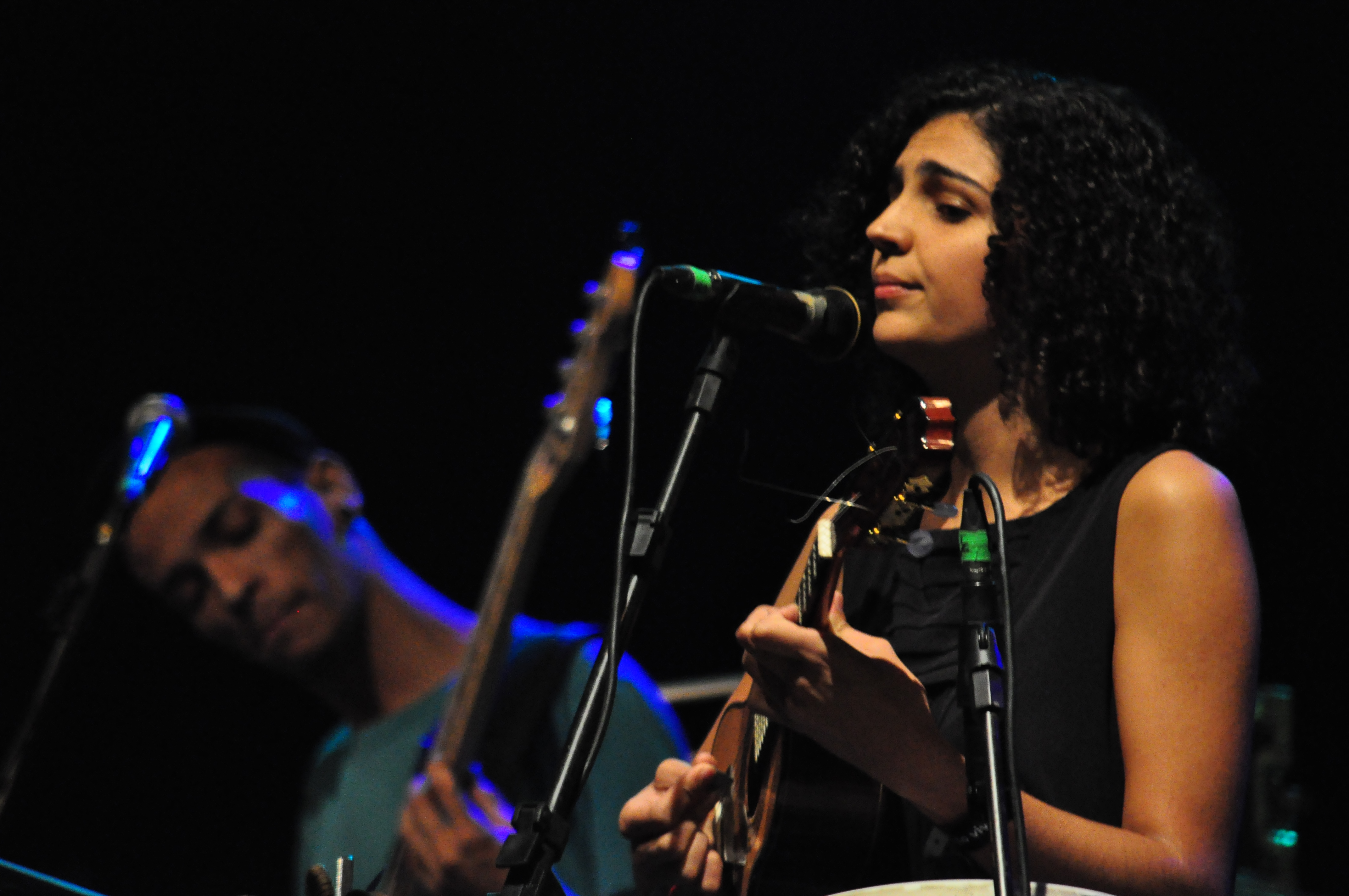 Graveola e o Lixo Polifônico no Conexão Vivo 2013 em Belo Horizonte